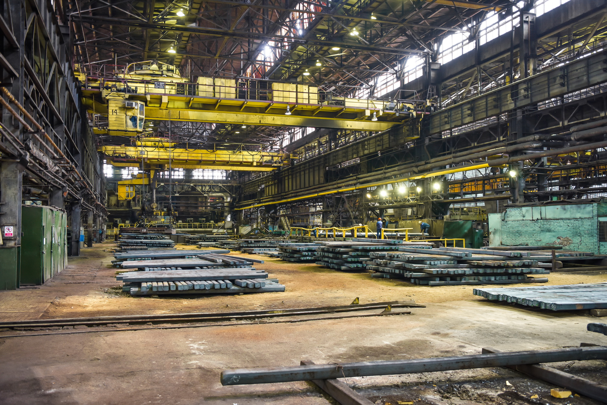 Кировский завод – металлургическое производство – завод Петросталь